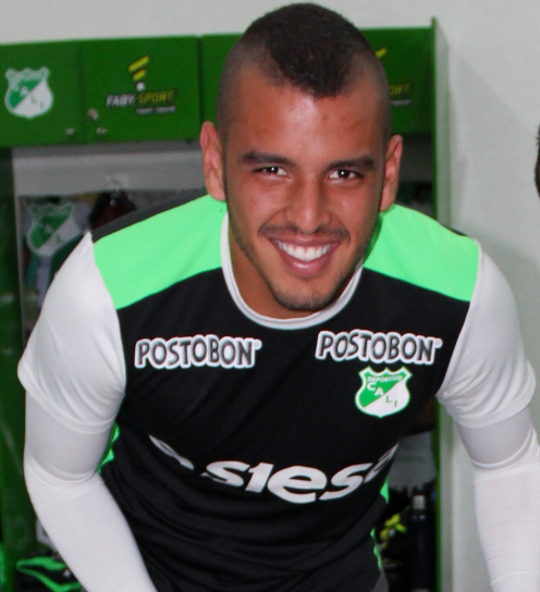 Luis Hurtado jugador canterano del Deportivo Cali